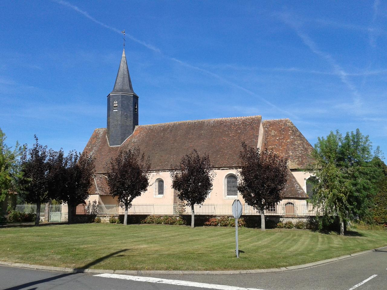 église Saint-Martin de Vieuvicq (28120), Eure-et-Loir, France (12ème siècle).